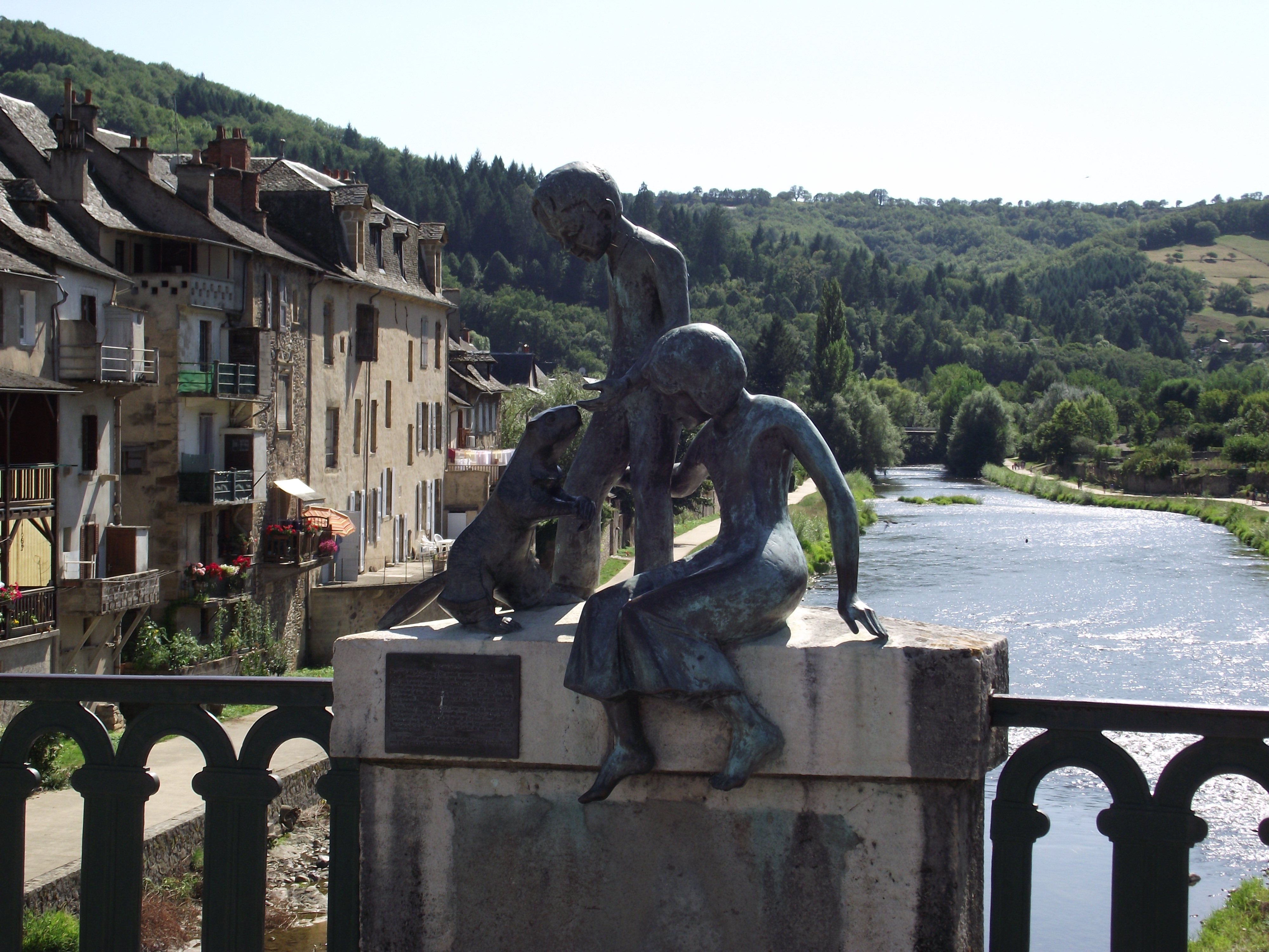 Statue des "marmots" à St Geniez d'Olt (Aveyron)